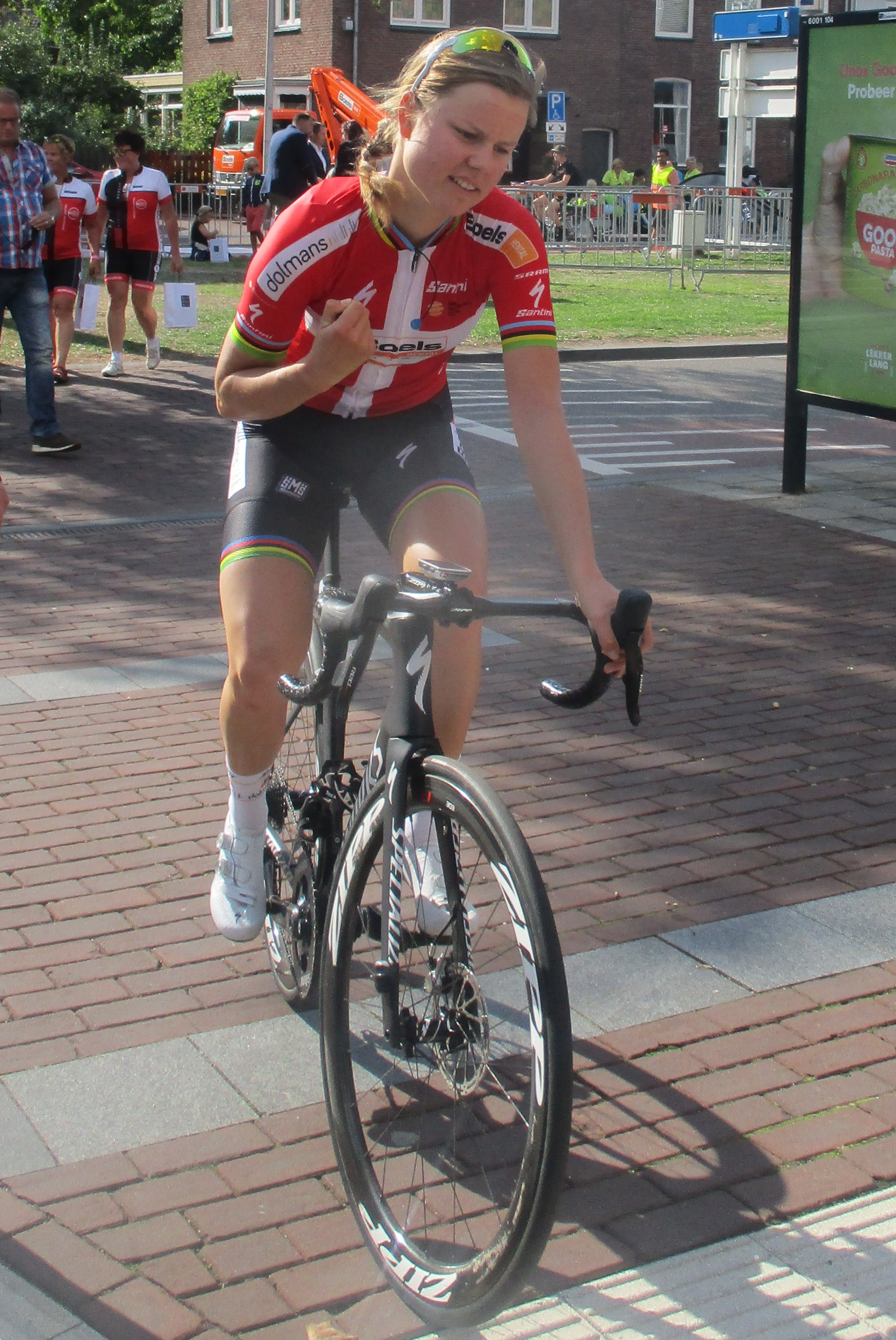 4e etappe van de Boels Ladies Tour 2018 door Noord-Limburg, finish in Weert.